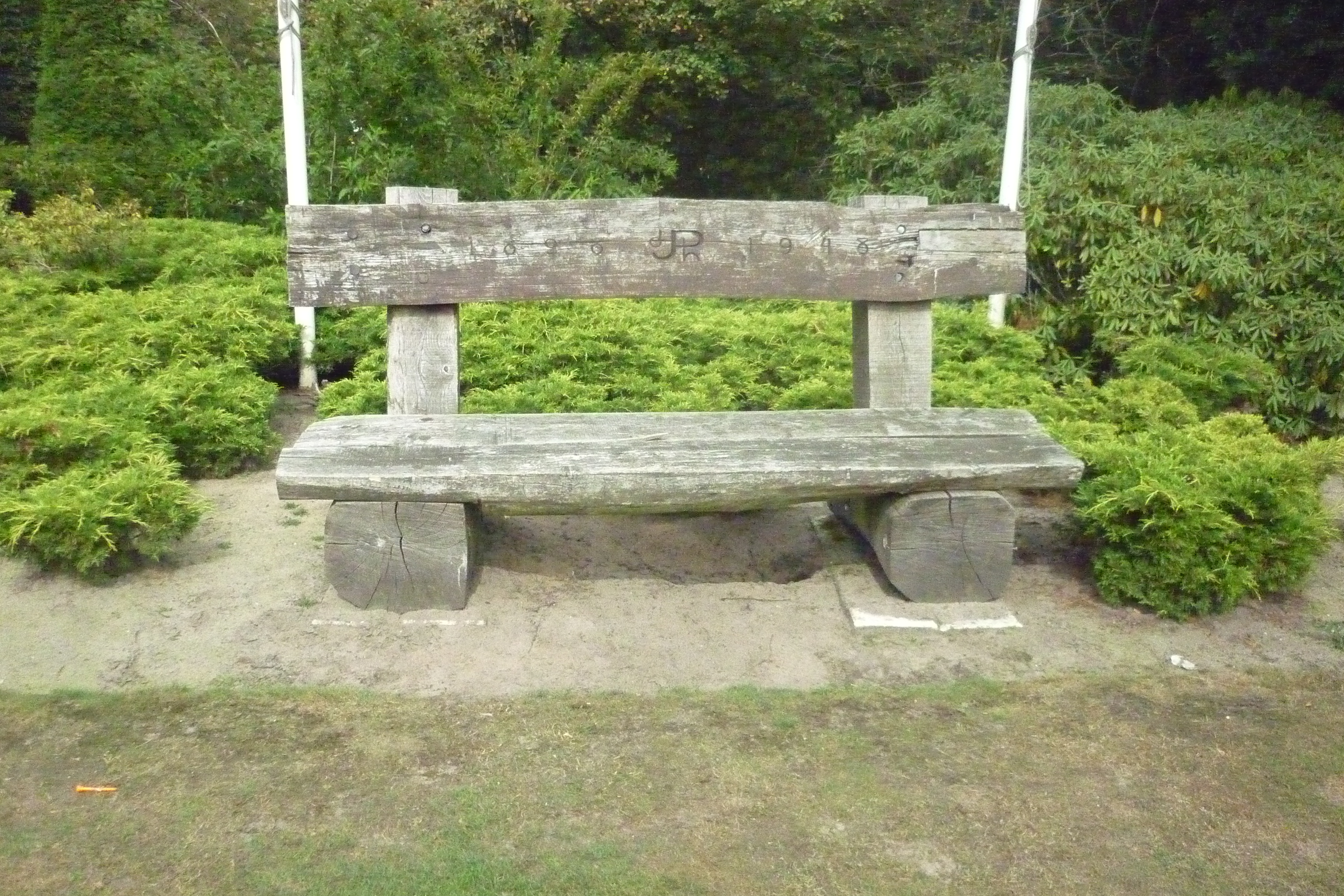 Eindhovensche Golf, tee 10